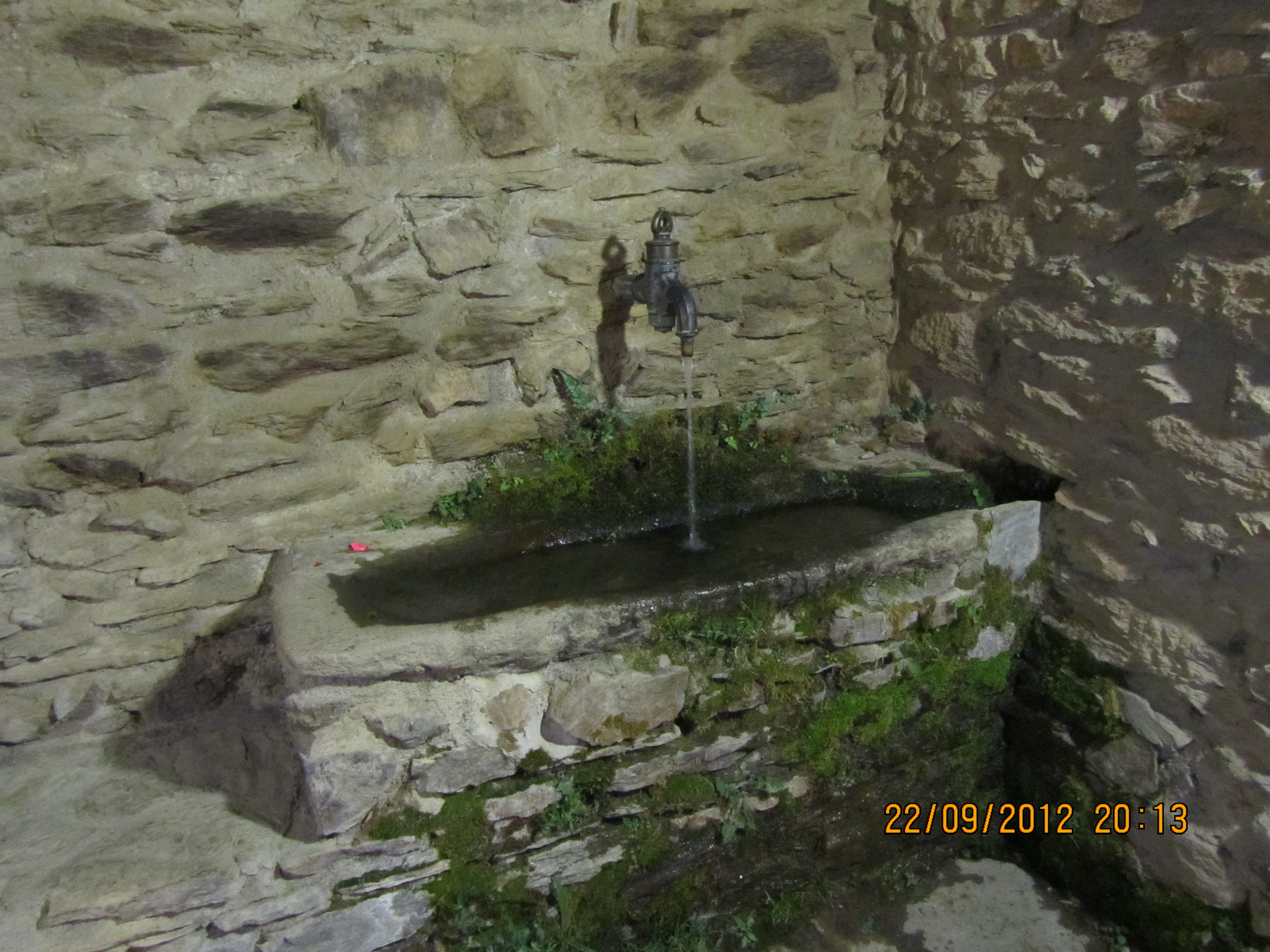 Font de la plaça d'Éller, entitat de població pertanyent al municipi de Bellver de Cerdanya, Baixa Cerdanya